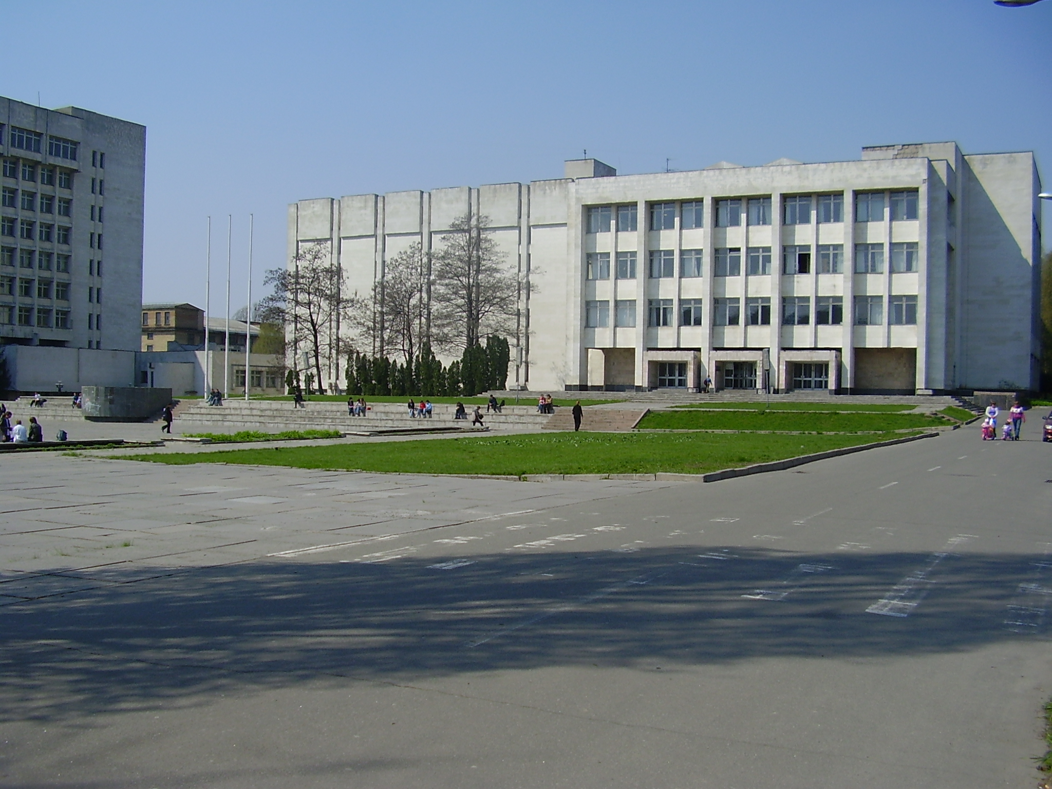 KPI - Technical Library :: Библиотека политеха